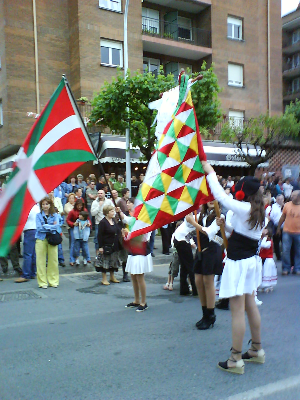 Uso de la bandera de Abadiño (Vizcaya, País Vasco (España)) en un acto festivo